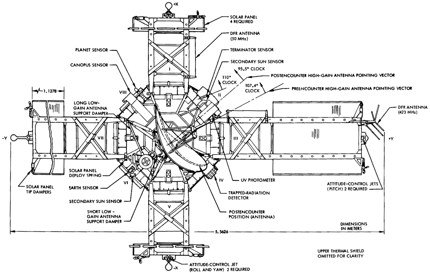 Mariner 5 diagram